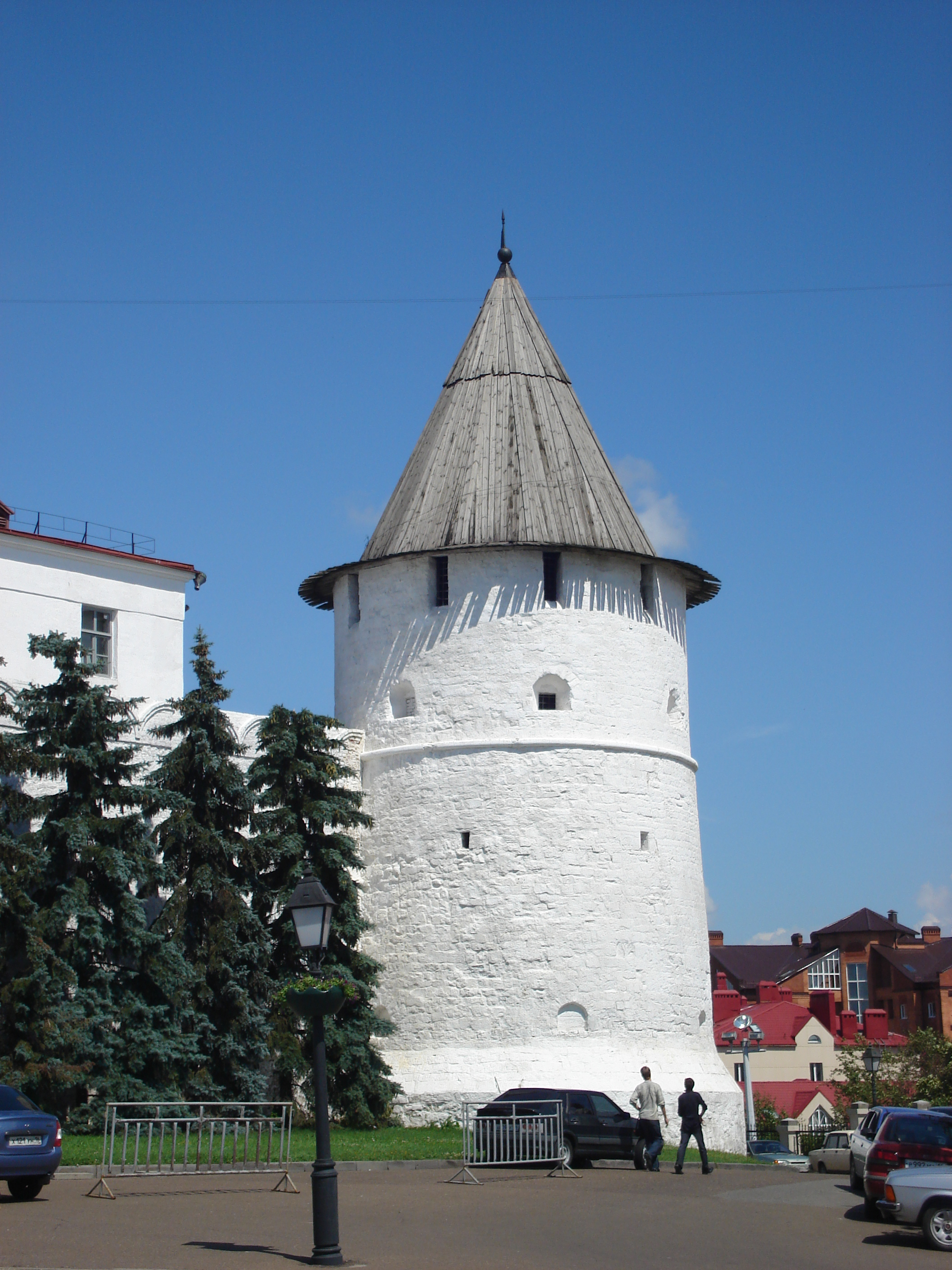 Kazan Kremlin